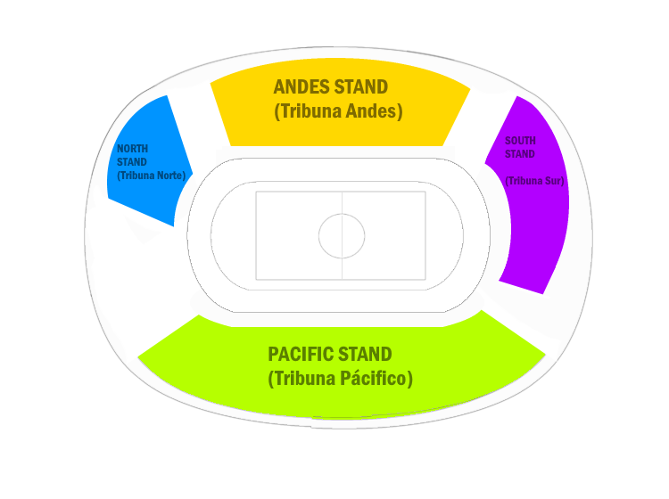 Diagrama del estadio Calvo y Bascuñan de Antofagasta